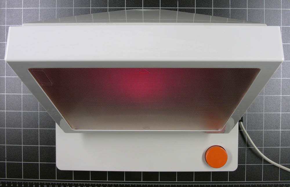 Darkroom lamp